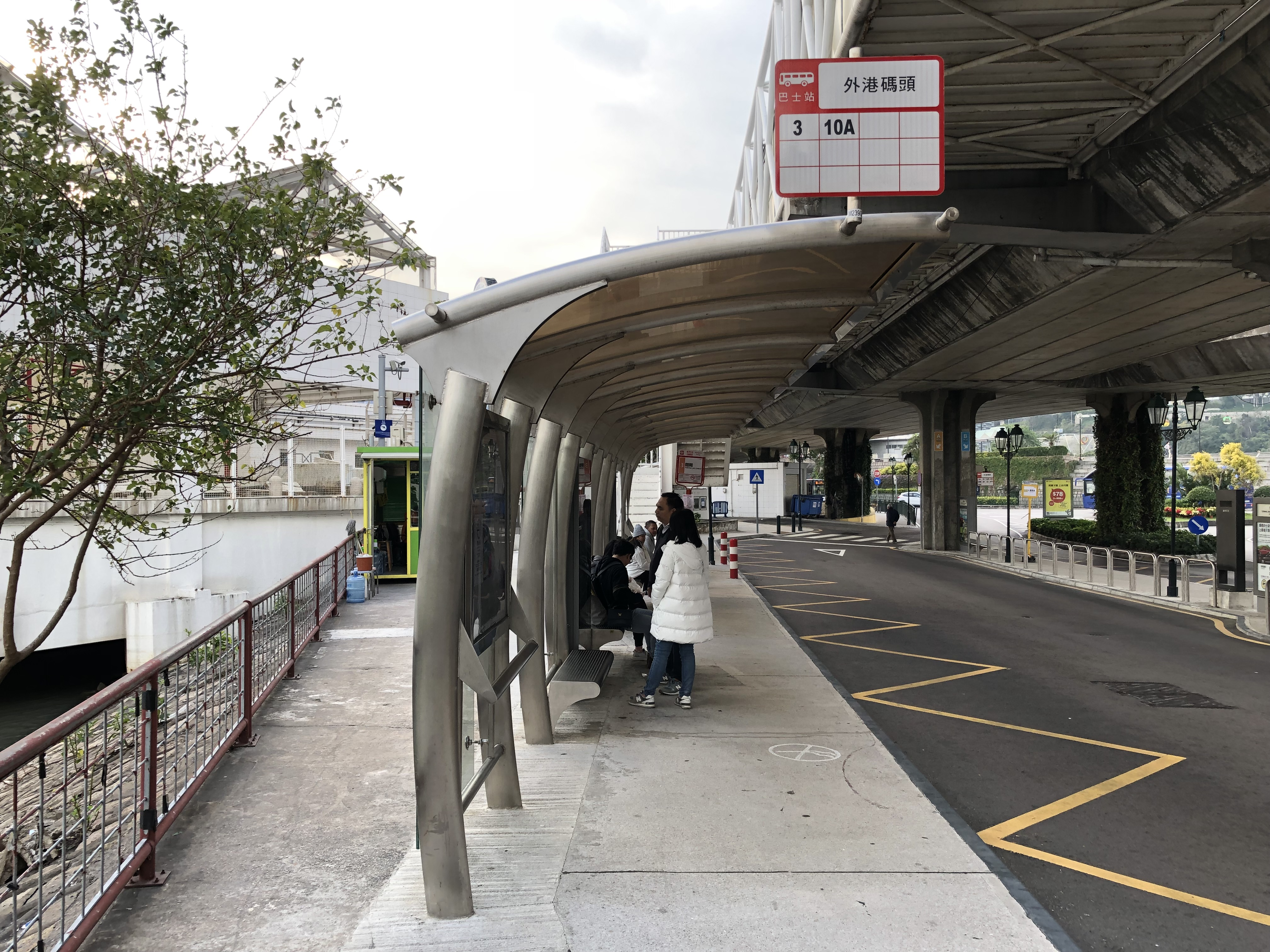 2019年1月的外港碼頭站.